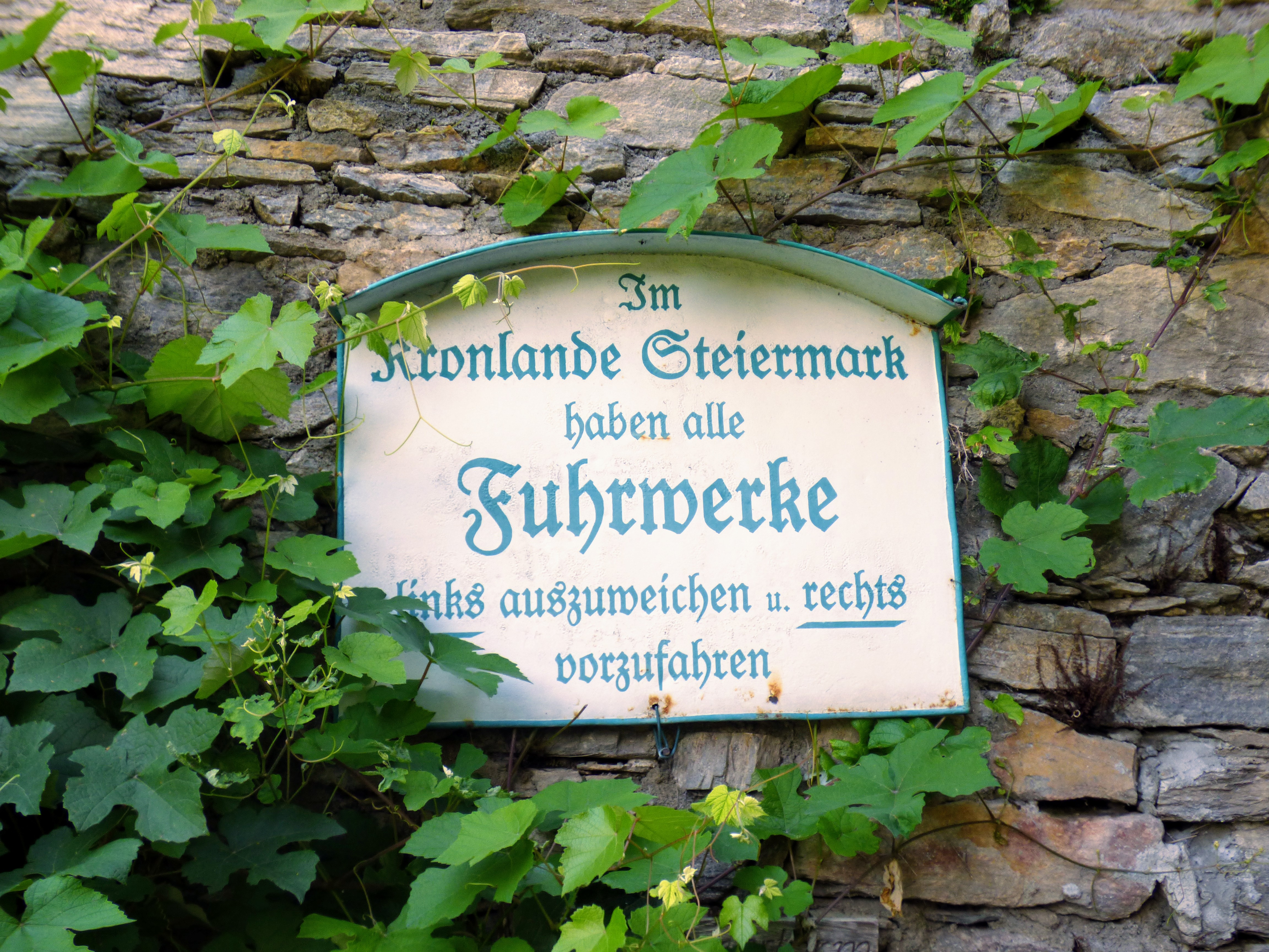 Burgruine Dürnstein: Hinweis auf Linksverkehr für Fuhrwerke in der Steiermark